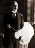 Ernesto de la Cárcova (1866—1927)